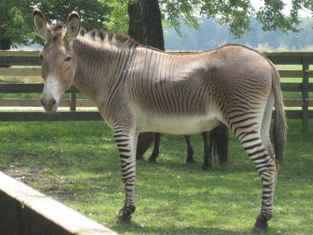 An Zonky: half zebra & half donkey.